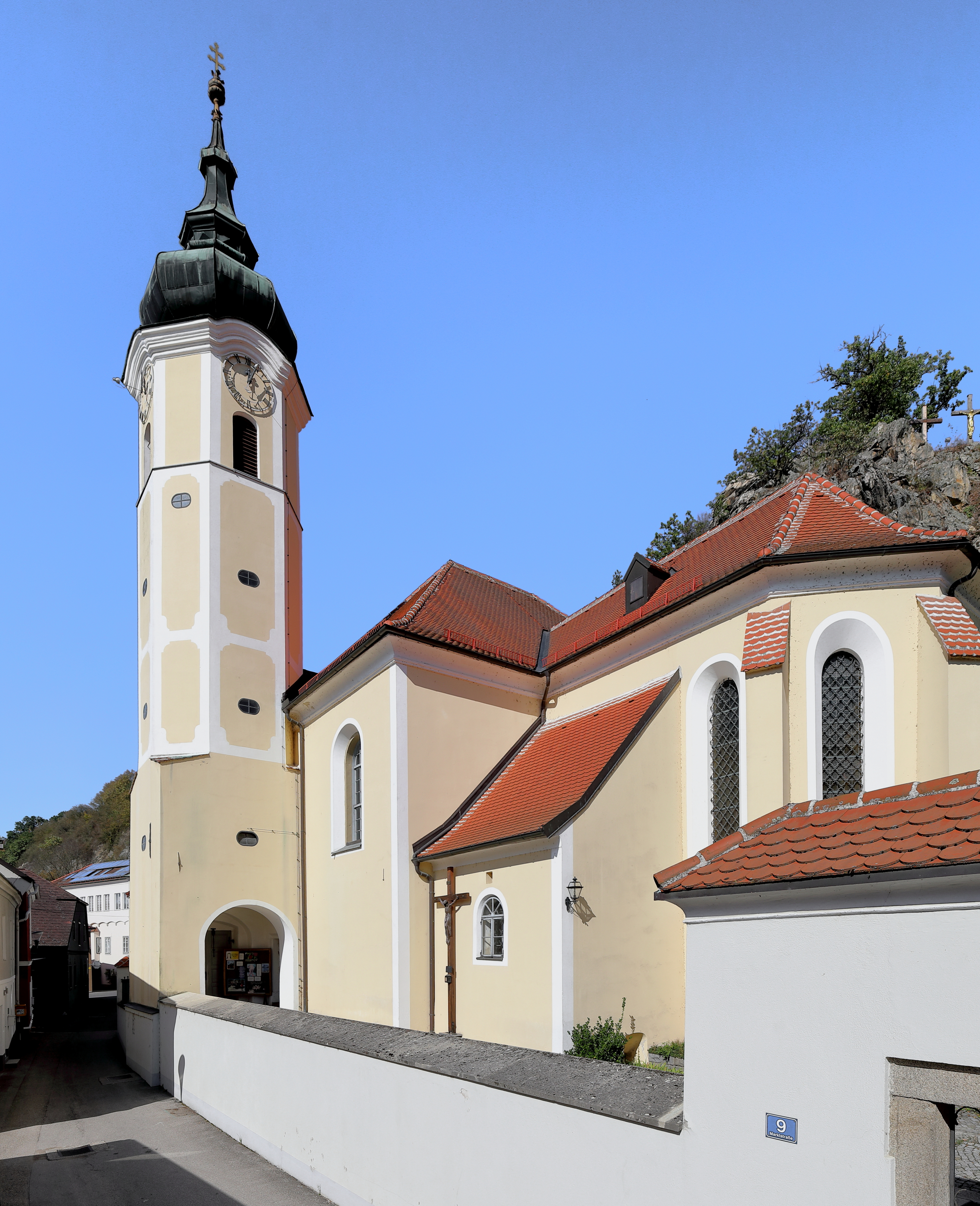 Südostansicht der röm.-kath. Pfarrkirche hl. Martin in der niederösterreichischen Marktgemeinde Marbach an der Donau.